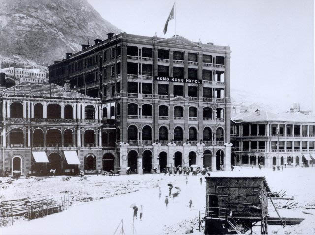 Hong Kong Hotel, Praya Central, Hong Kong Island, c.1900